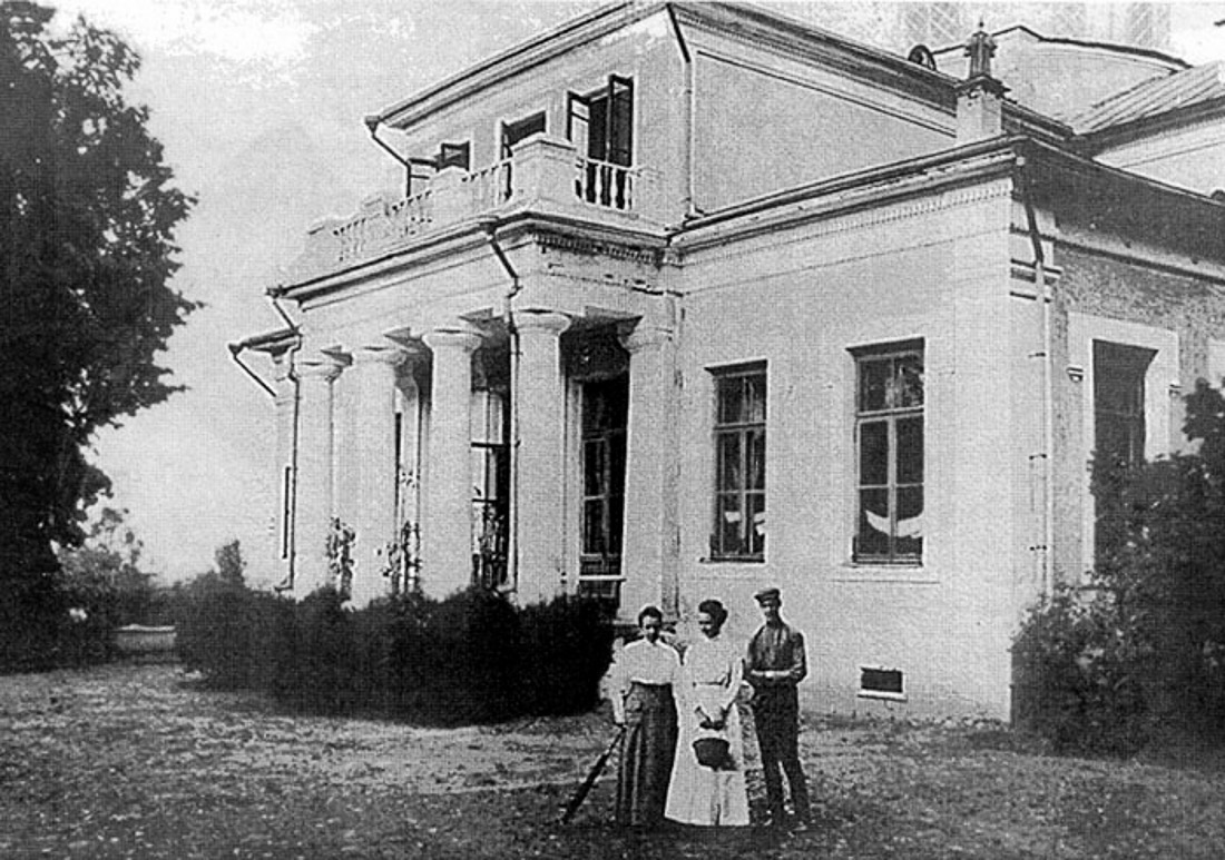 Фотография начала XX века.